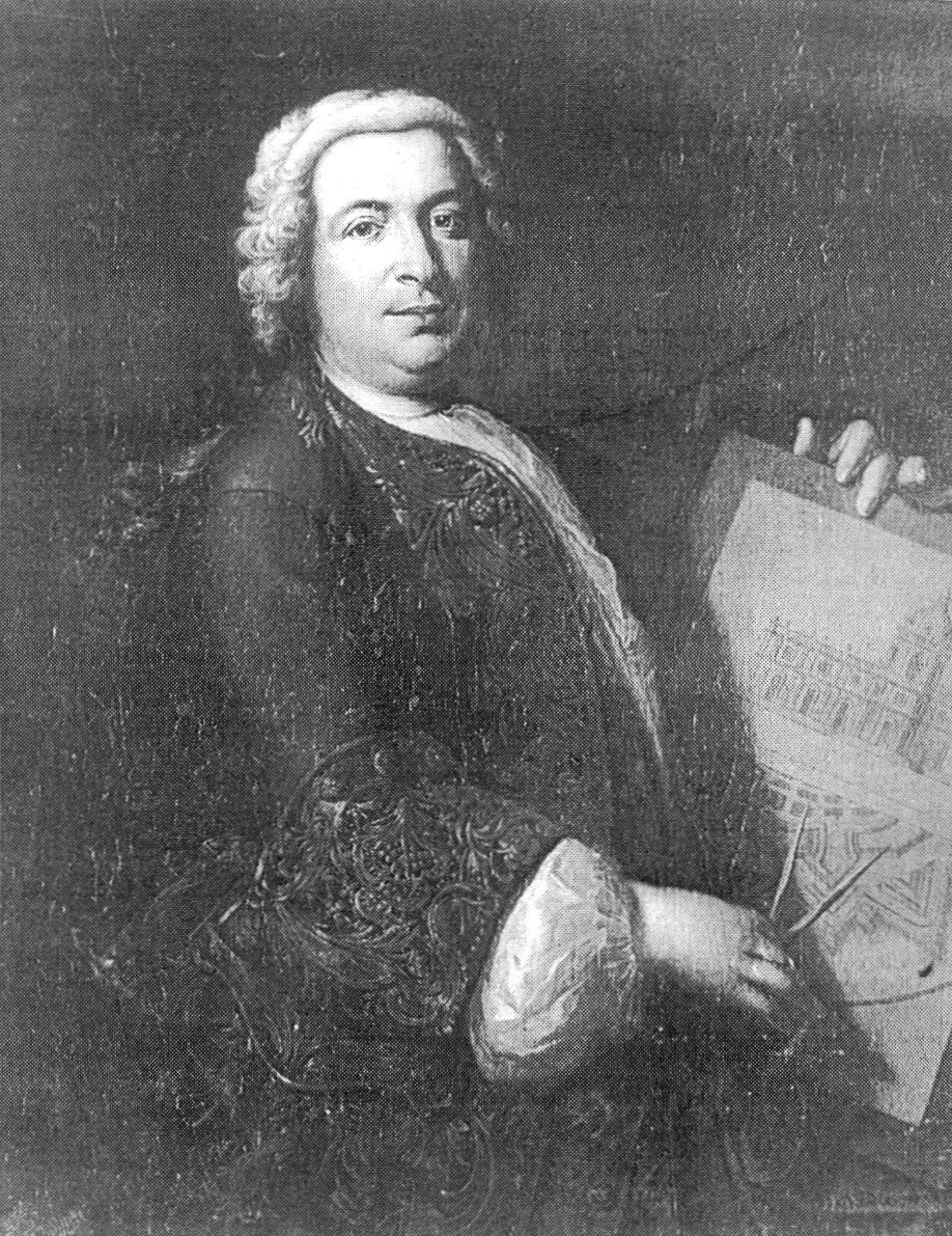 Rymer Nickele: Porträt von Leopoldo Retti